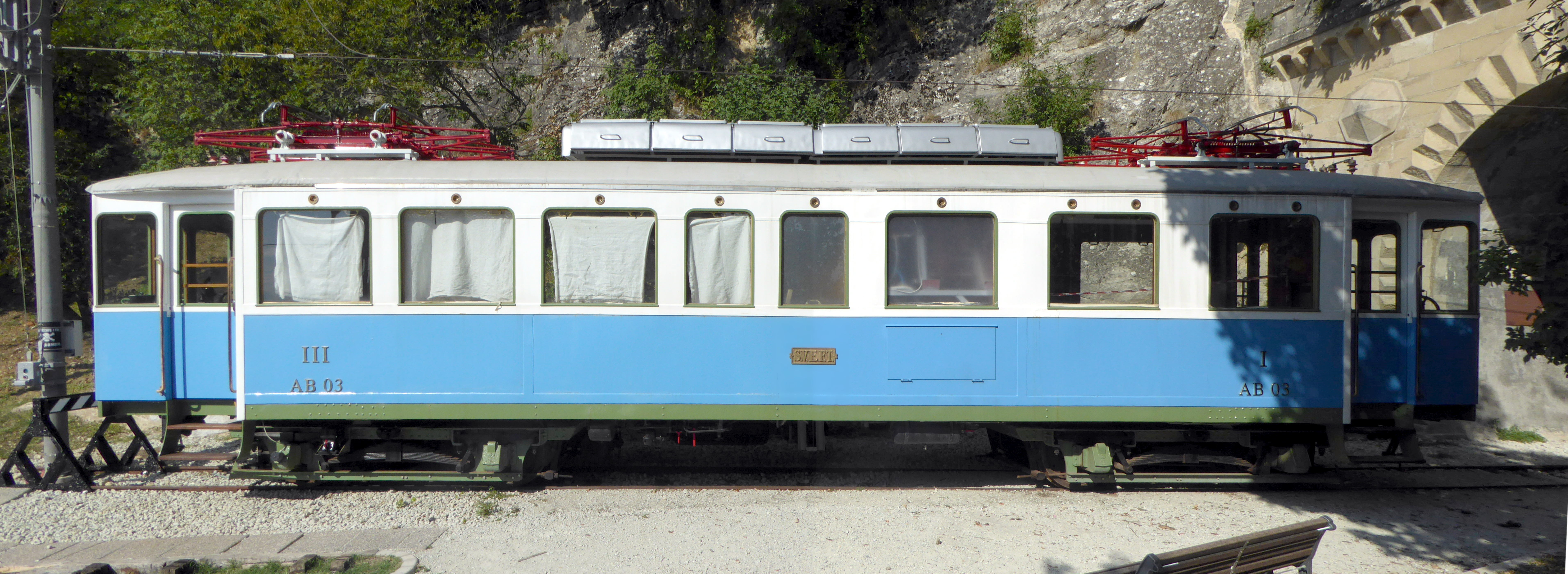 Triebwagen der früheren Schmalspurbahn nach San Marino (Ausstellungsstück).